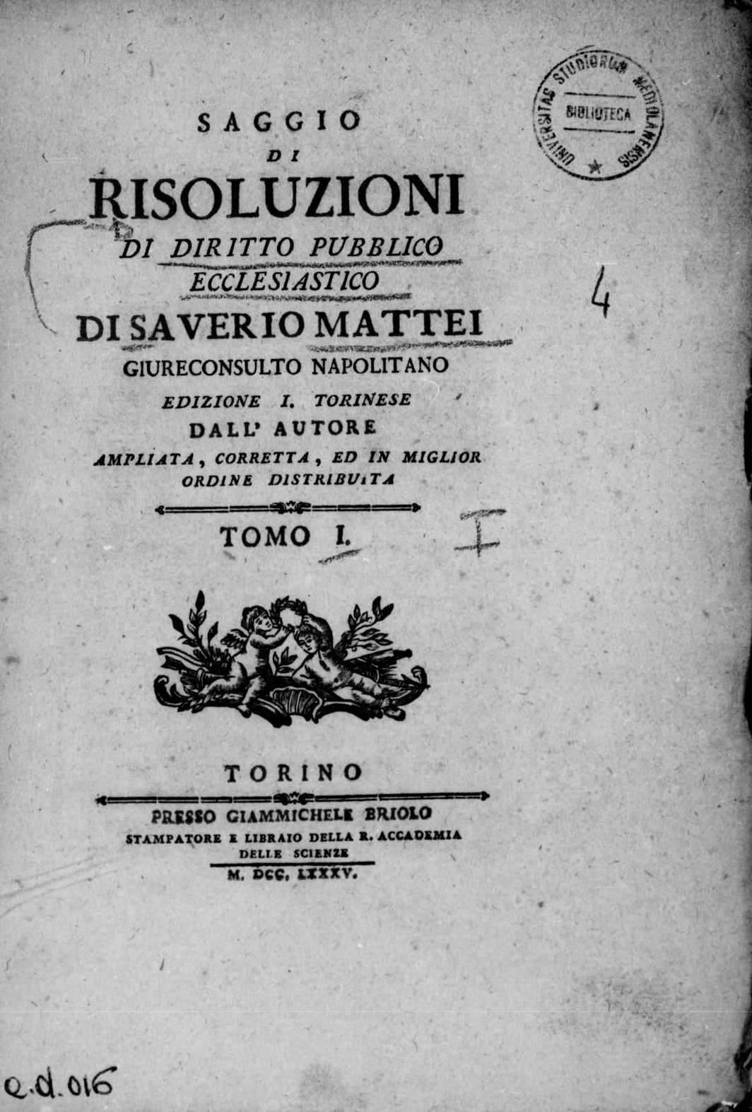 Frontespizio